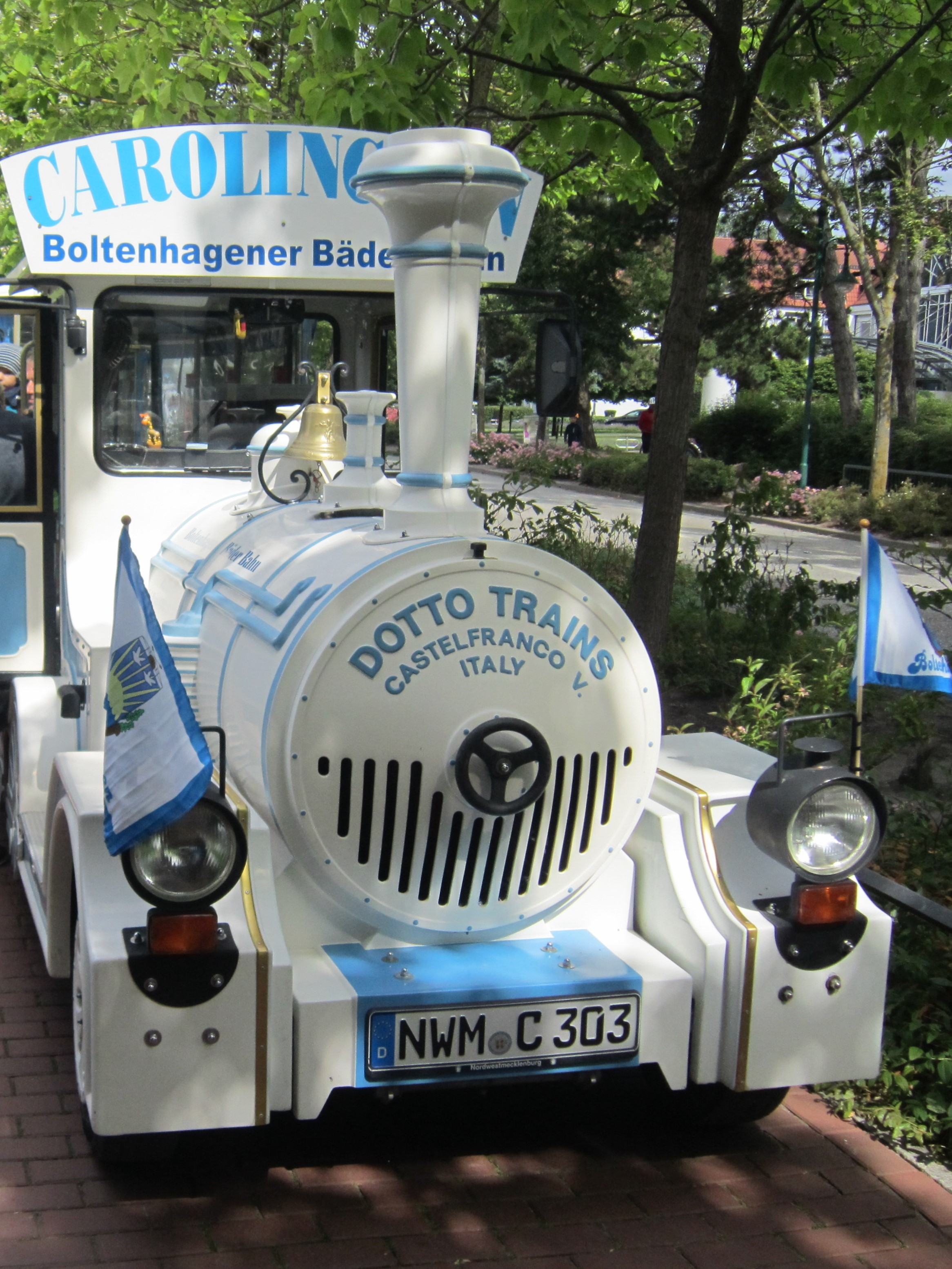 Wegebahn ("Bimmelbahn") Carolinchen vor dem Kurhaus des Ostseebads Boltenhagen